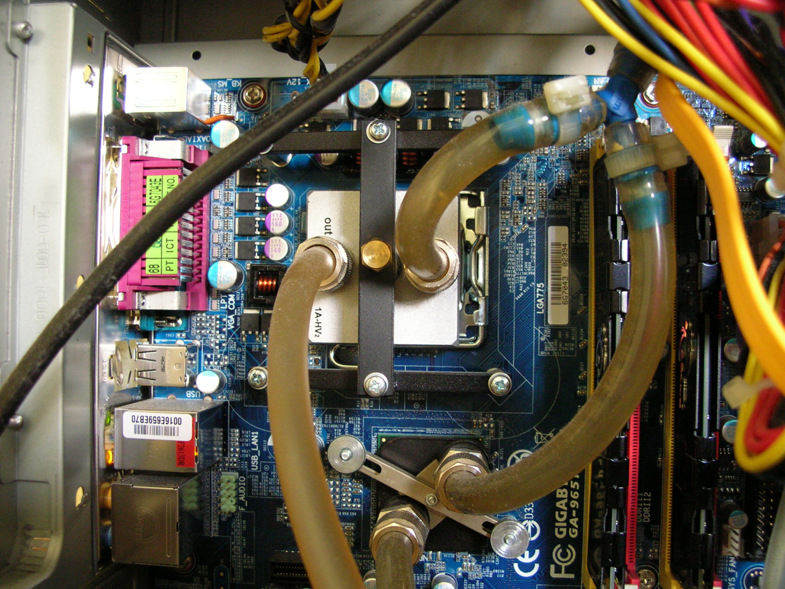 Blocs en cuivre fixés sur un processeur et sur le northbridge (chipset) de la carte mère. Pour refroidissement à eau (watercooling).